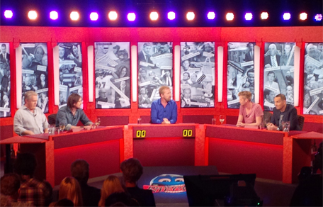 Opname 200e aflevering Dit was het nieuws. V.l.n.r.: Thomas Acda, Mattie Valk, Harm Edens, Wietze de Jager en Raoul Heertje.